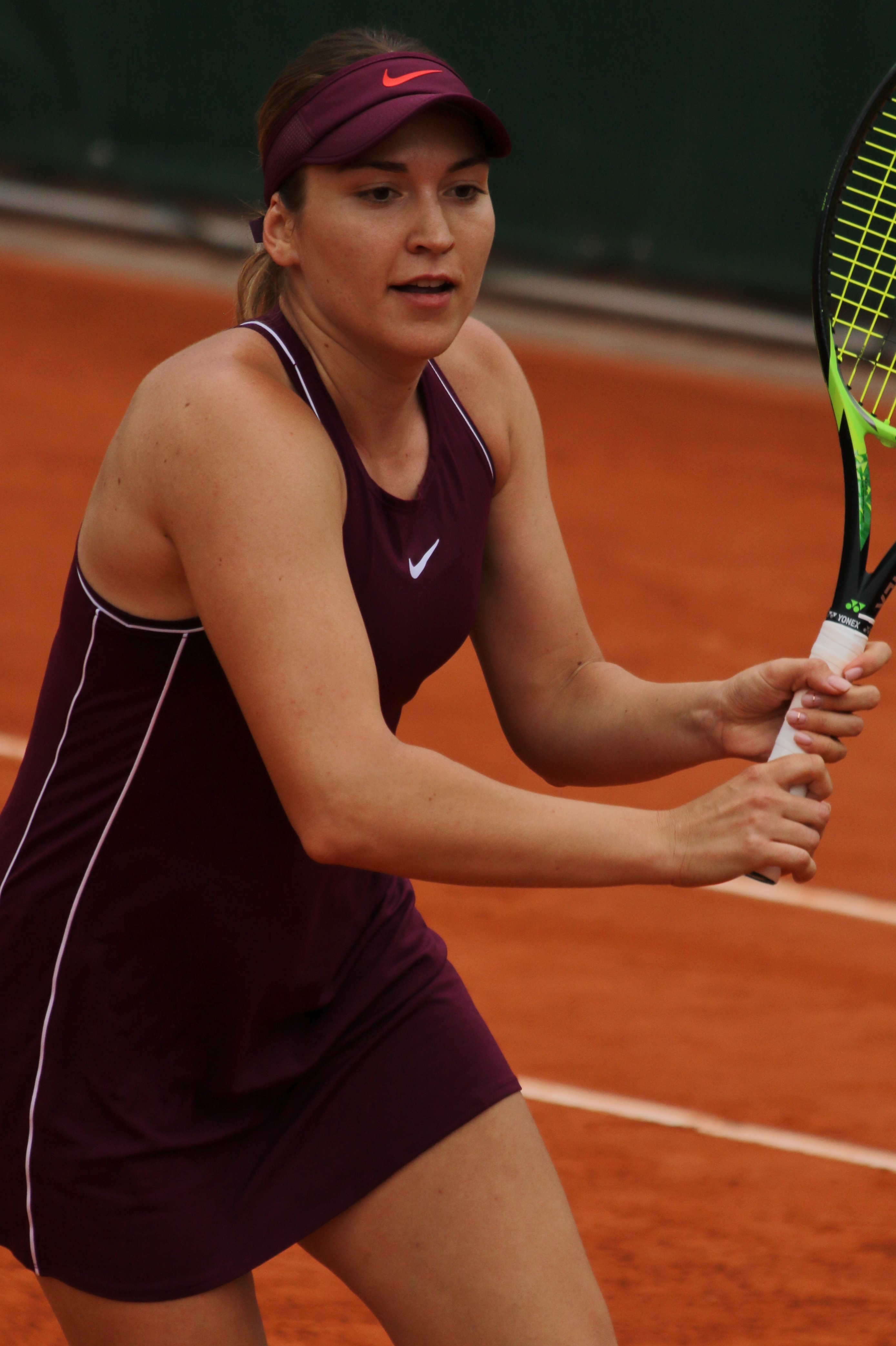 Dzalamidze RG19 (1)